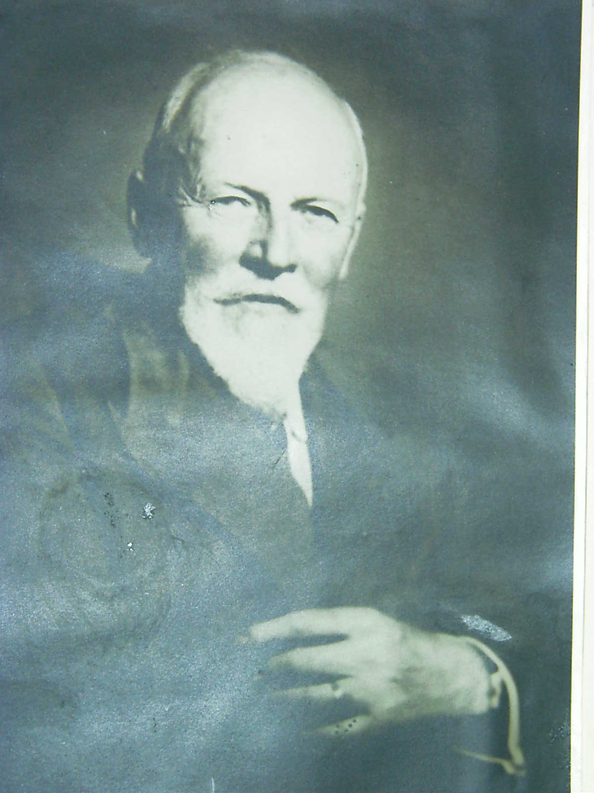 Altersbildnis von Prof. Dr. Heinrich Bulle vom 26. August 1939; aus Familienarchiv fotografiert Lizenz (abgekürzt „cc-by-sa“) in der Version 2.0